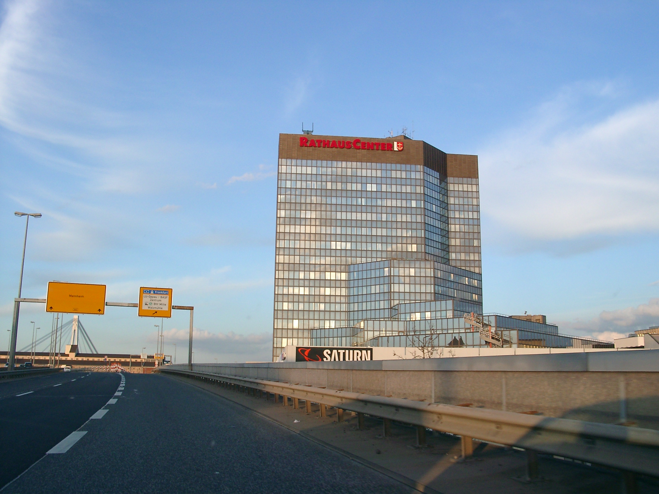 Ludwigshafen, Rathauscenter, von der B 44 aus gesehen